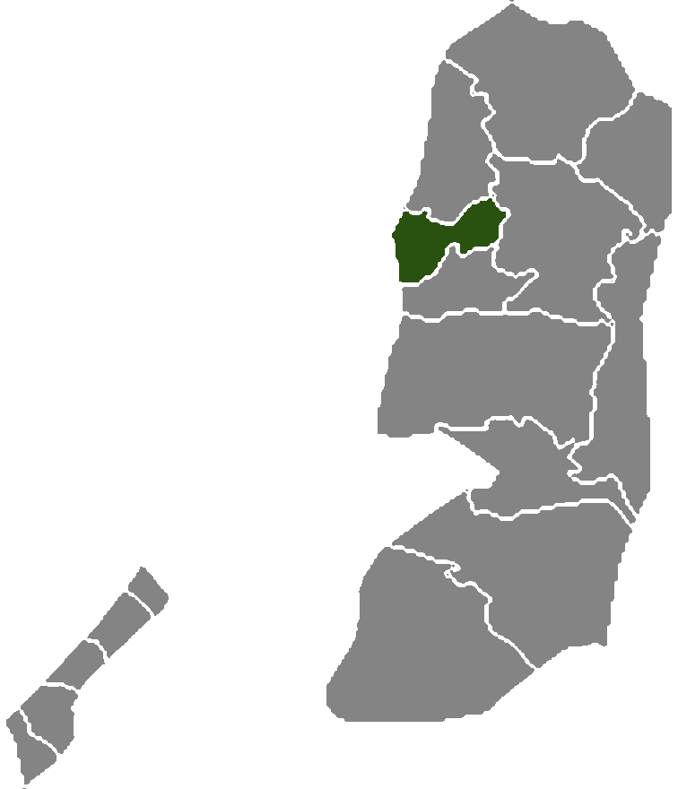 Palestine governorate Qalqilia